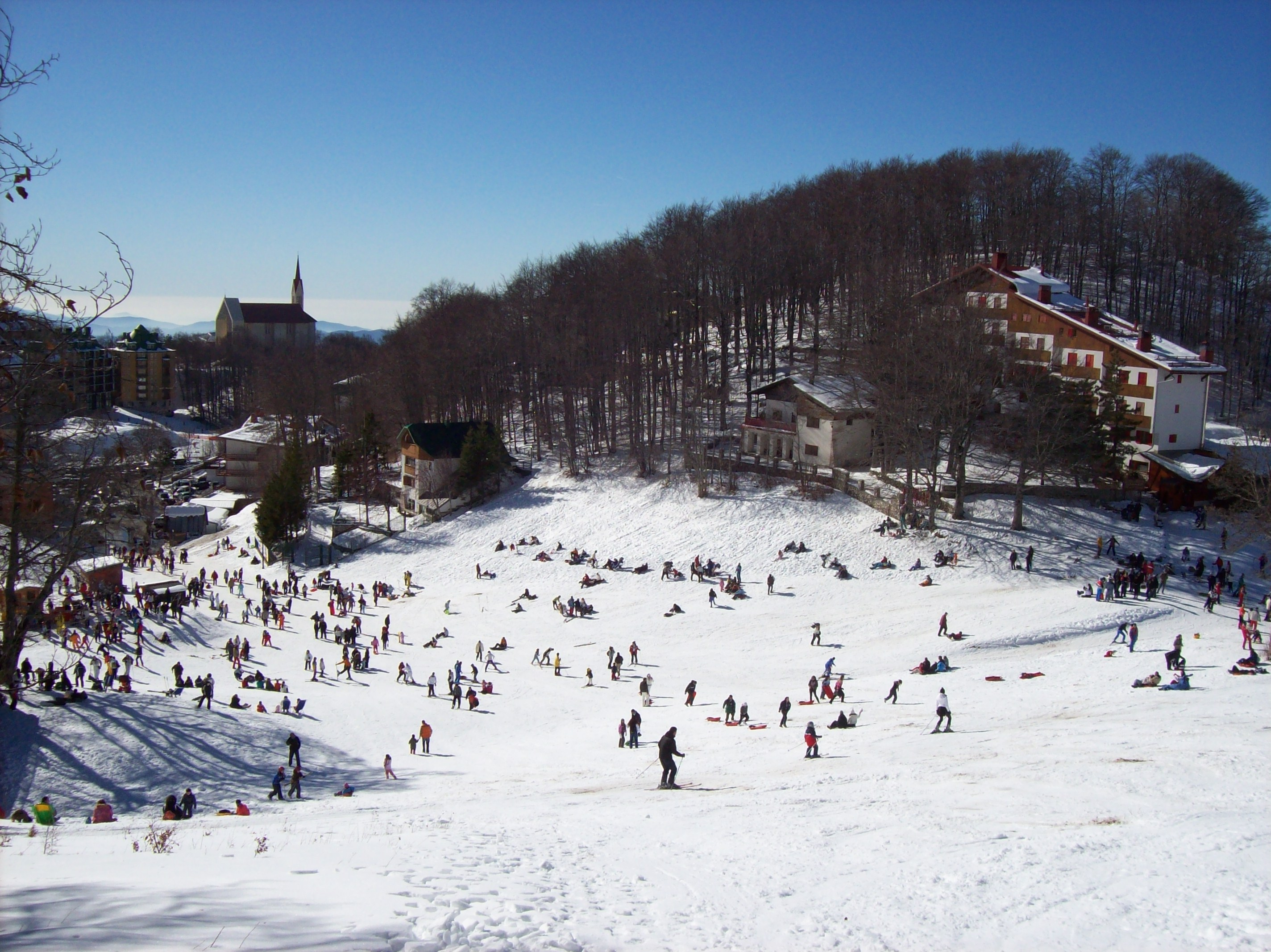 Scuola Sci a Monte Terminillo